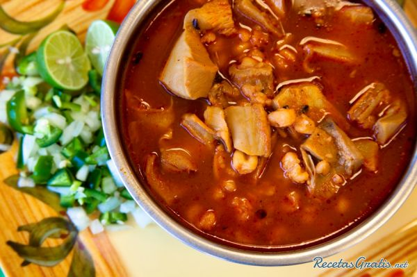 menudo de res, platillo típico de la región lagunera.